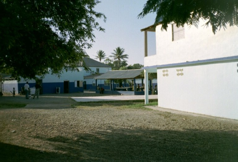 Zelfgemaakte foto